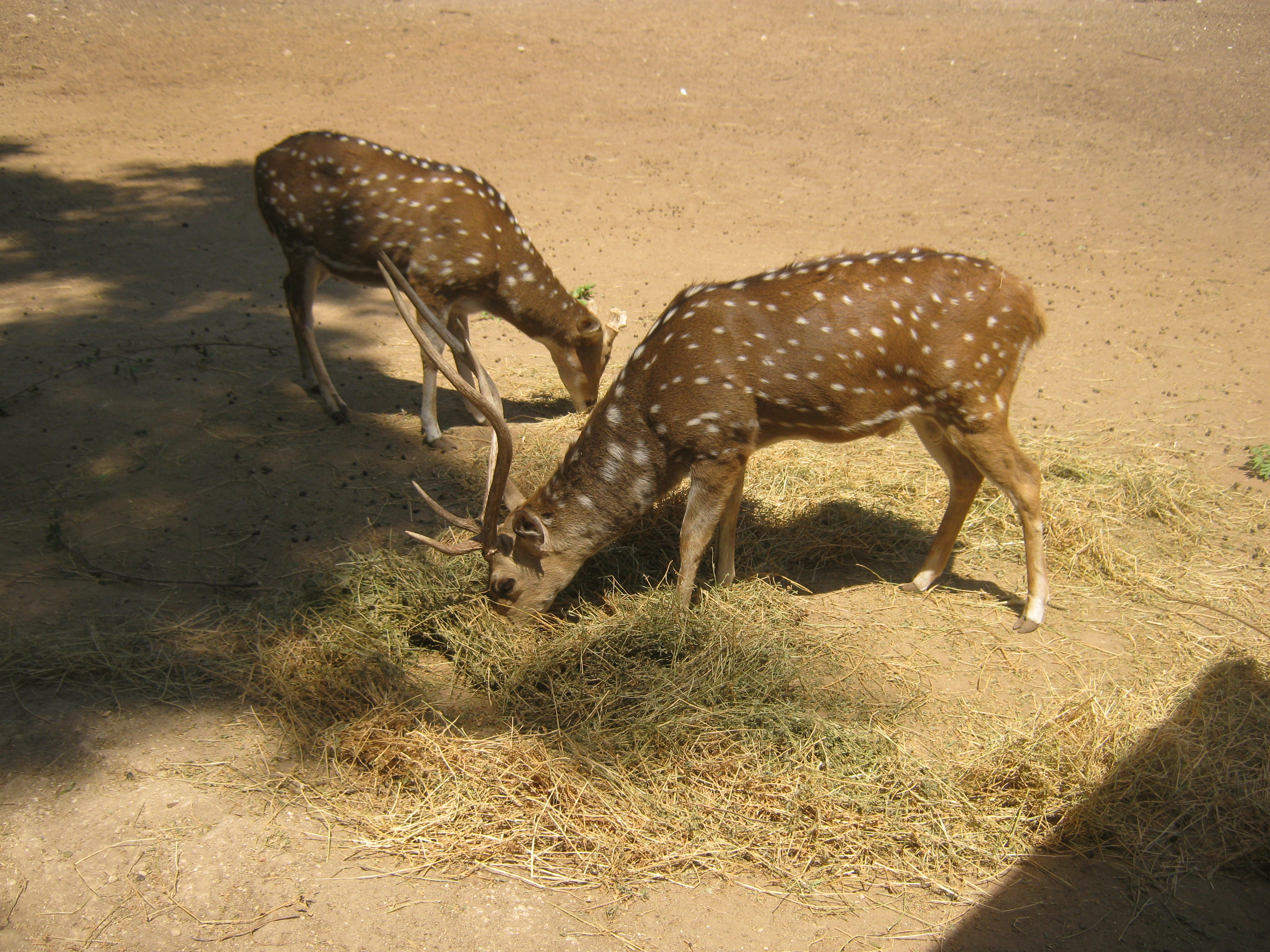 Axis axis en el Centro zoológico de Tel Aviv-Ramat Gan